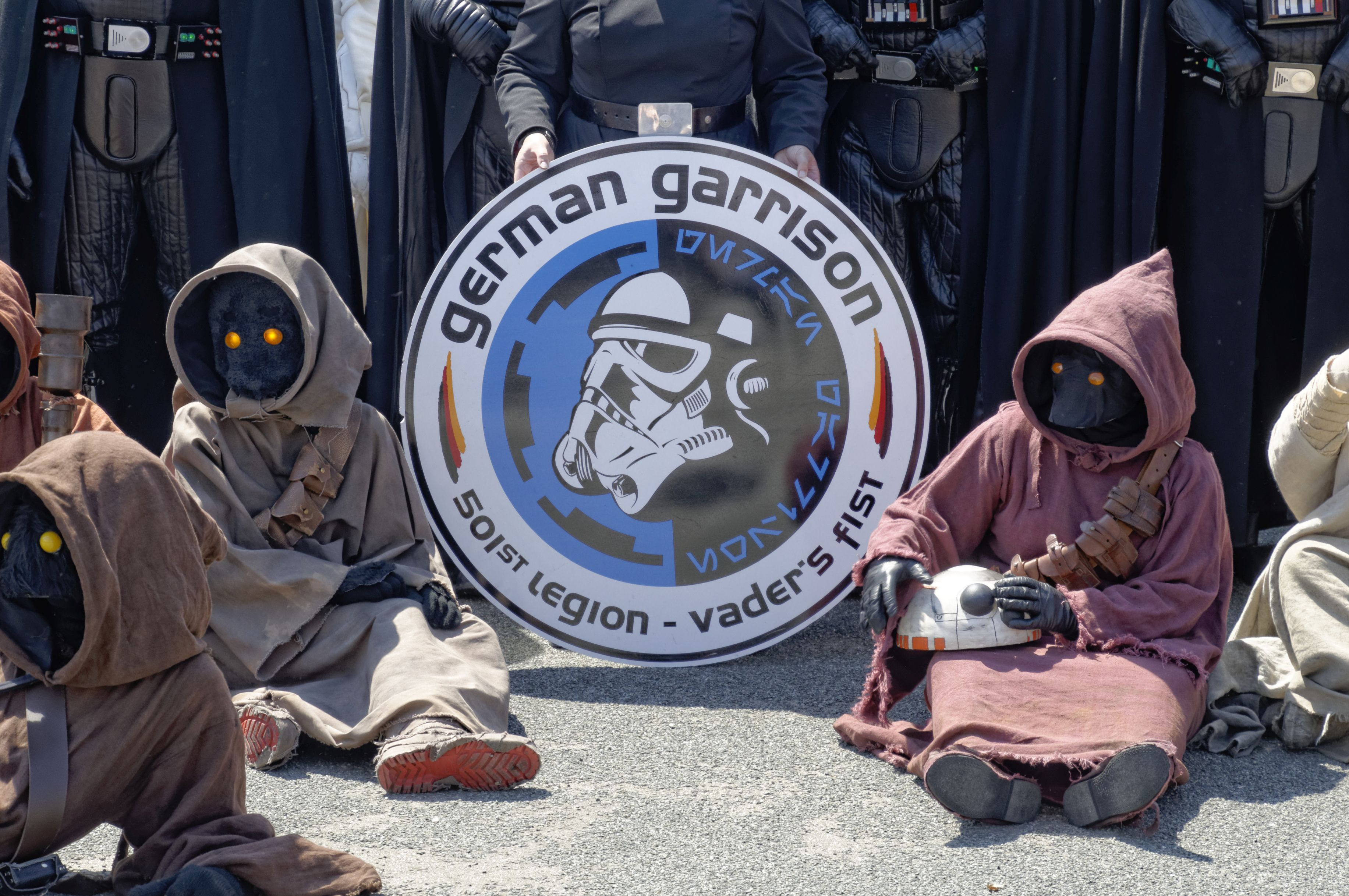 Bilder von der Comic Con Germany in Stuttgart 2018